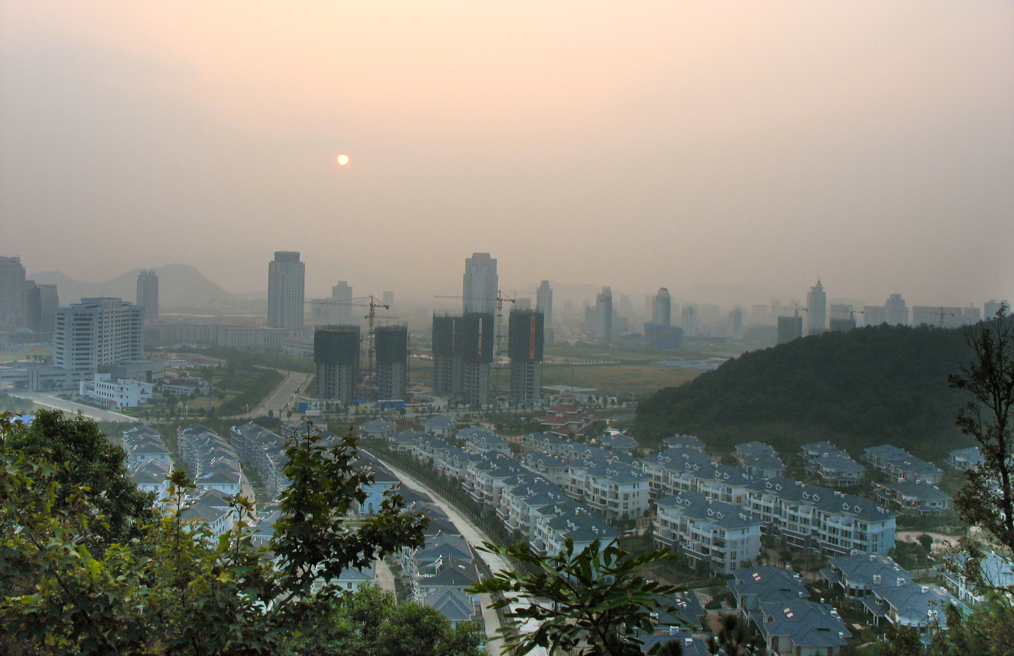 中文（中国大陆）: 台州城市风光